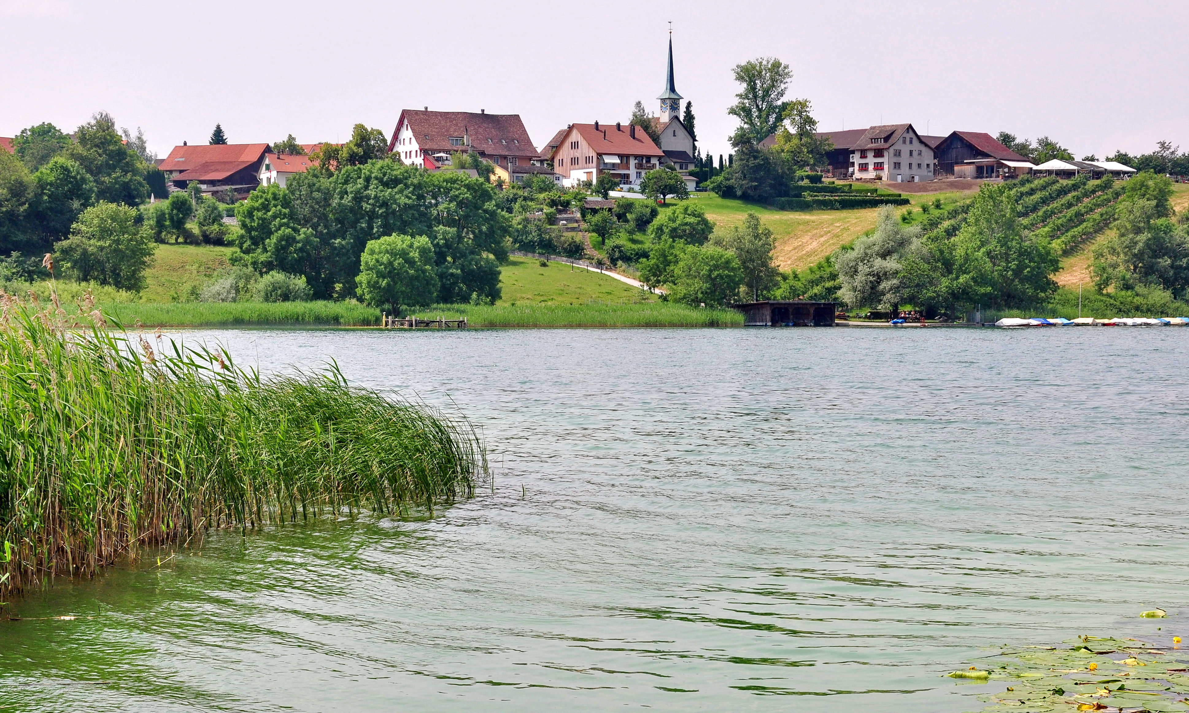 Der Pfäffikersee bei Irgenhausen (Pfäffikon), Seegräben im Hintergrund.